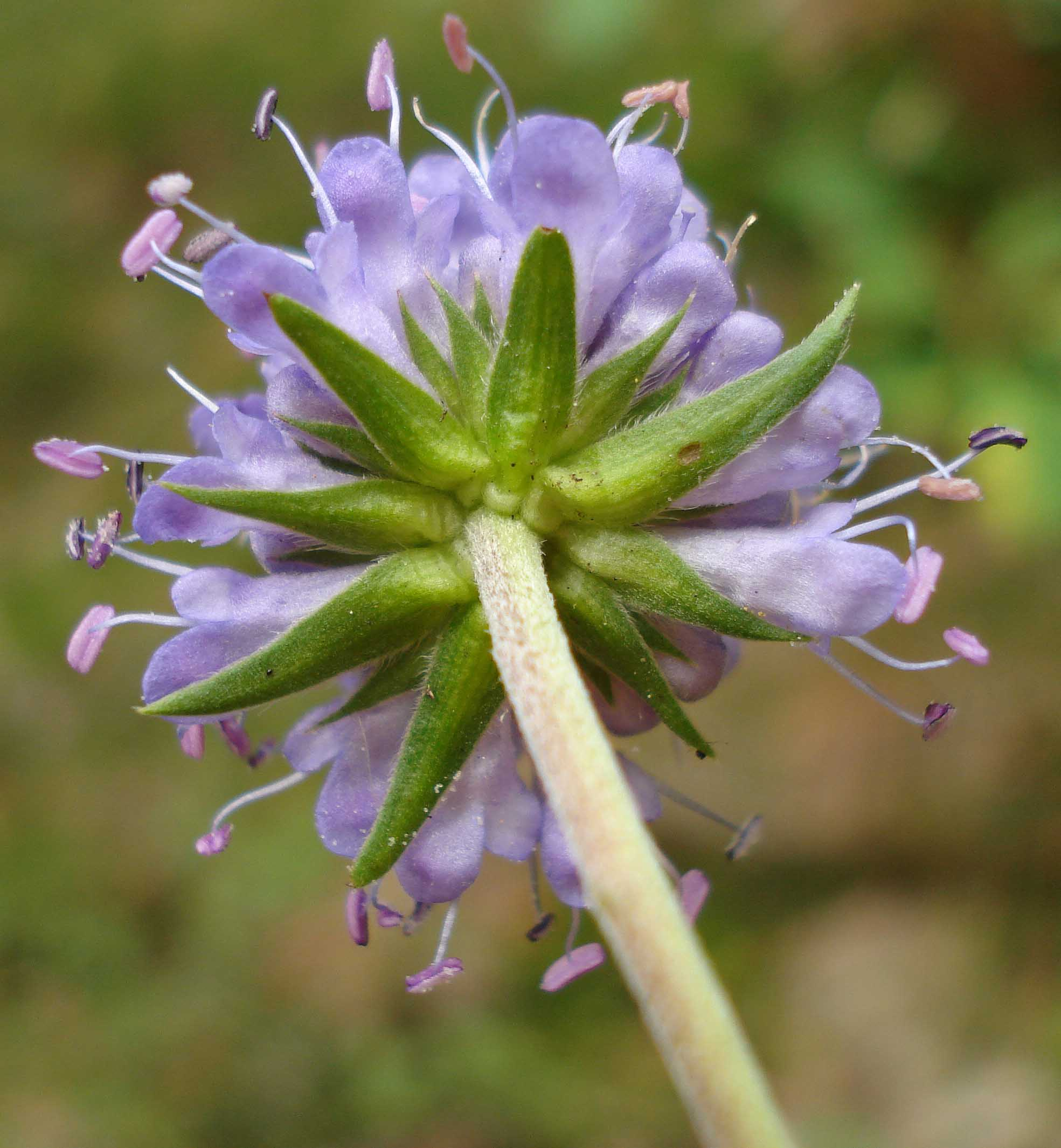 Succisa pratensis (Unterfranken, Germany)